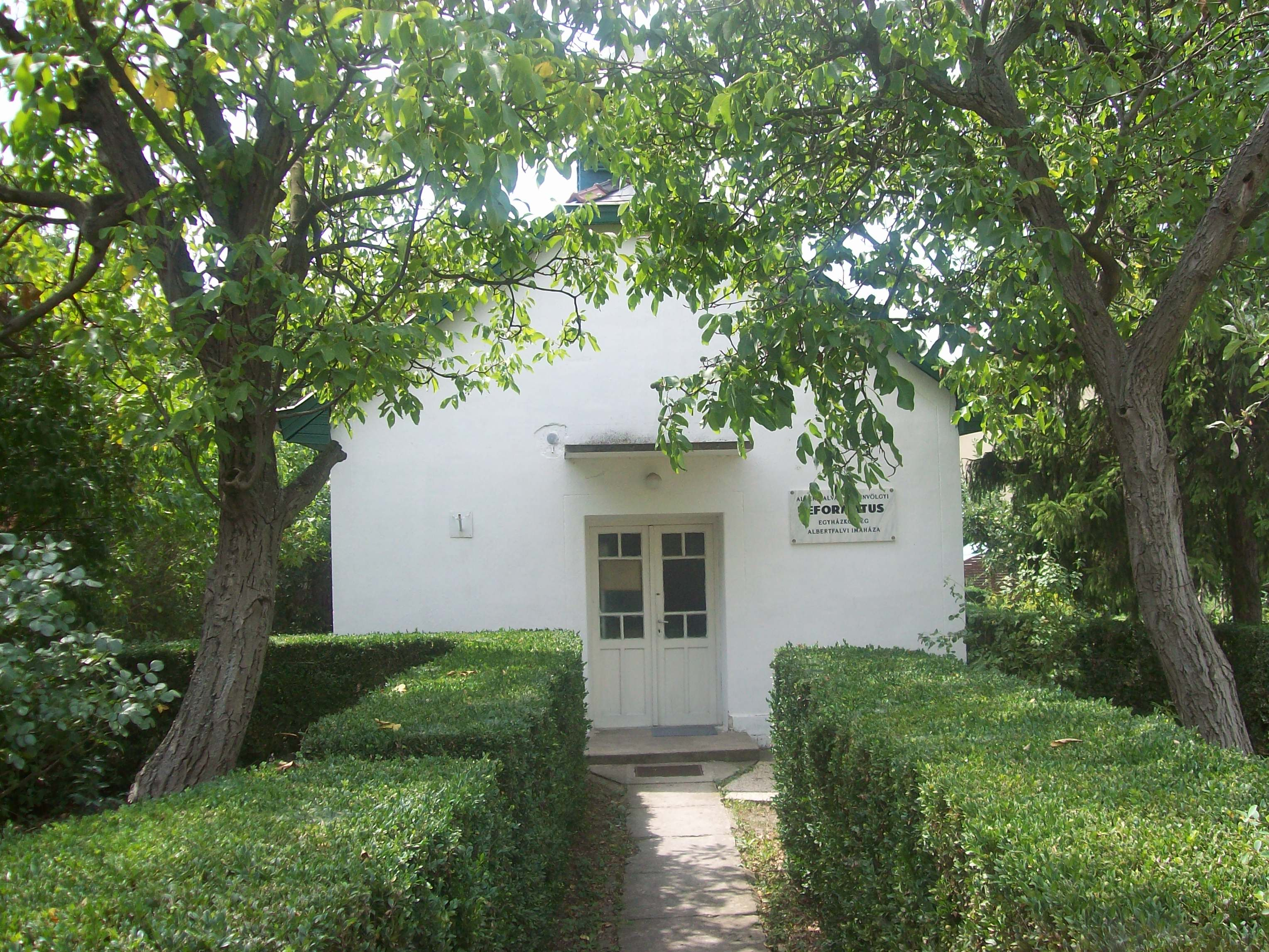 Az Albertfalvai és Kelenvölgyi Református Egyházközség albertfalvi imaháza.- Sáfrány utca, 17 Object location47° 26′ 57.34″ N, 19° 01′ 58.48″ E